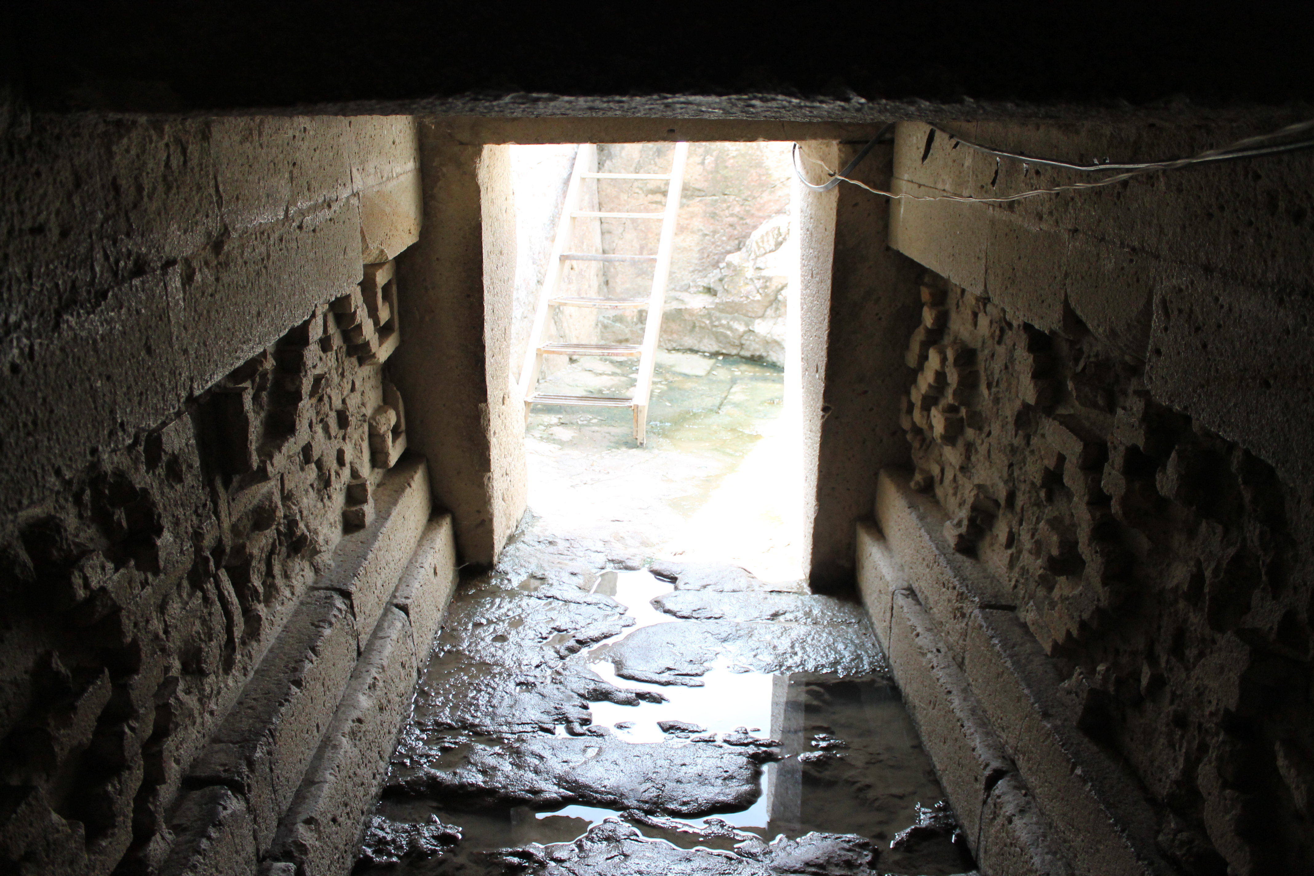 Se muestra, desde el interior, el acceso a una de las tumbas ubicadas en la zona arqueológica de Mitla. Los muros están ornamentados con grecas.